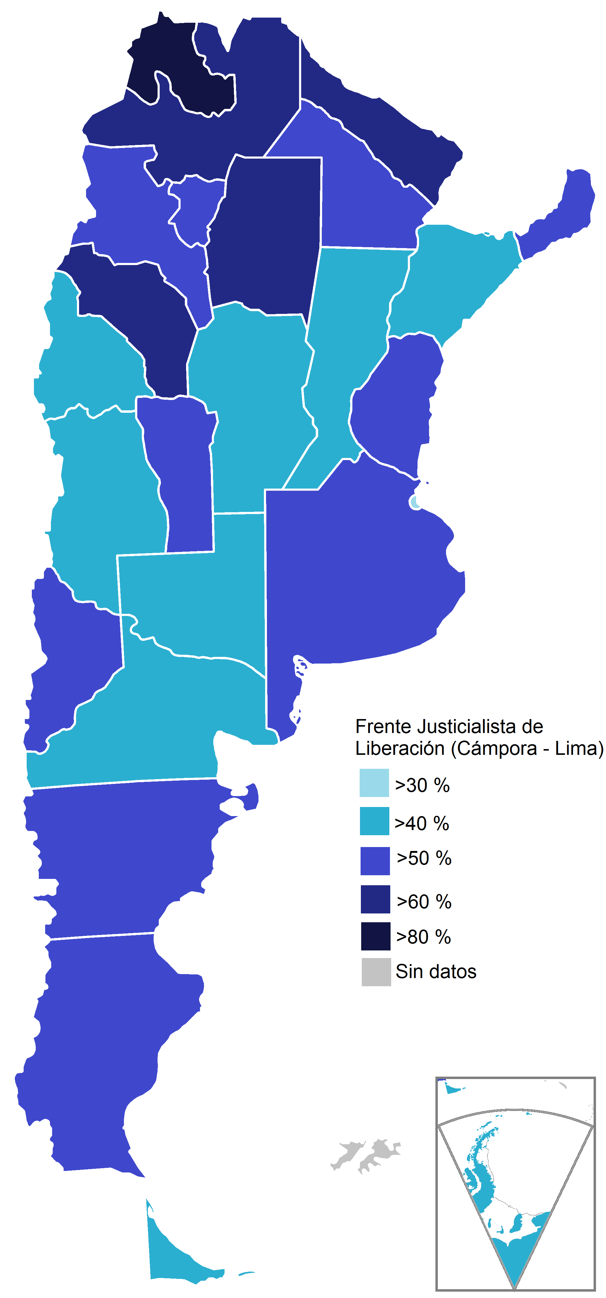 Mapa de las elecciones presidenciales de de Argentina de marzo de 1973, donde triunfó Hector Cámpora. La fuente no proporciona datos de Catamarca.